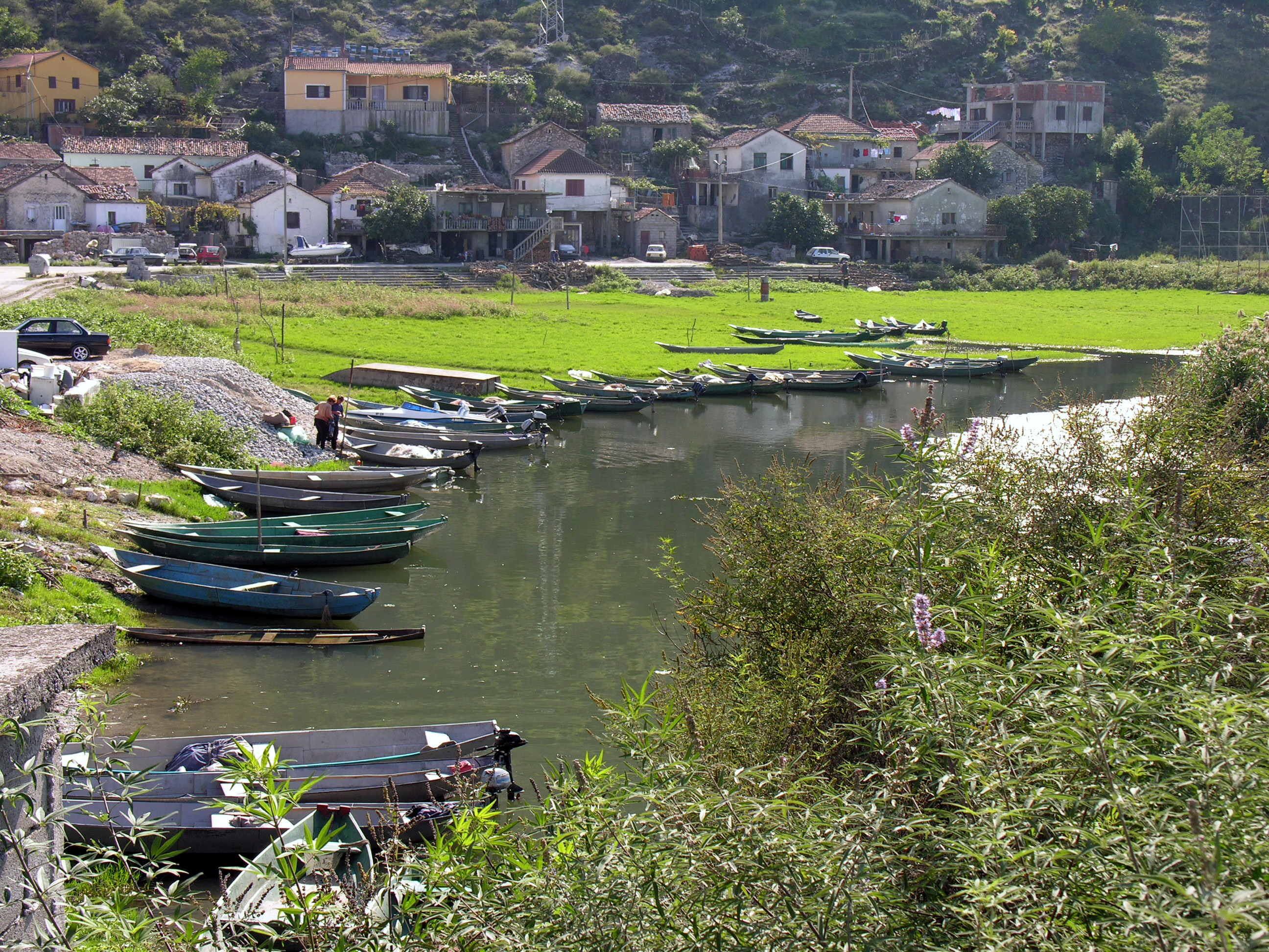 Fishing Village at Skadarsko Jezero